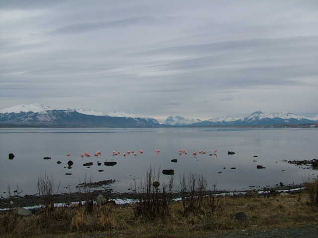 Ultima Esperanza Bay in Puerto Natales (Chile)